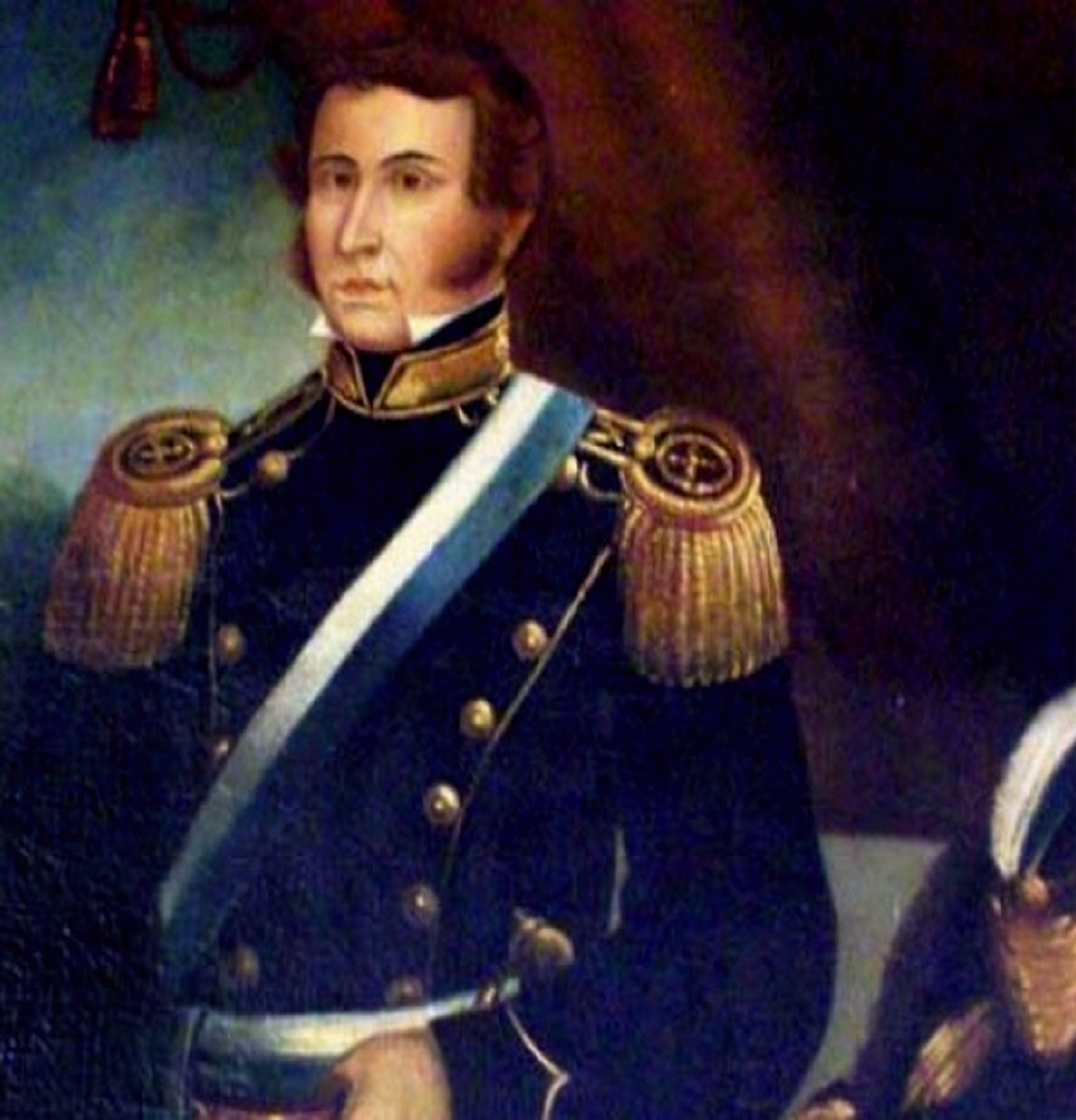 Retrato Oficial del Gobernador de Corrientes